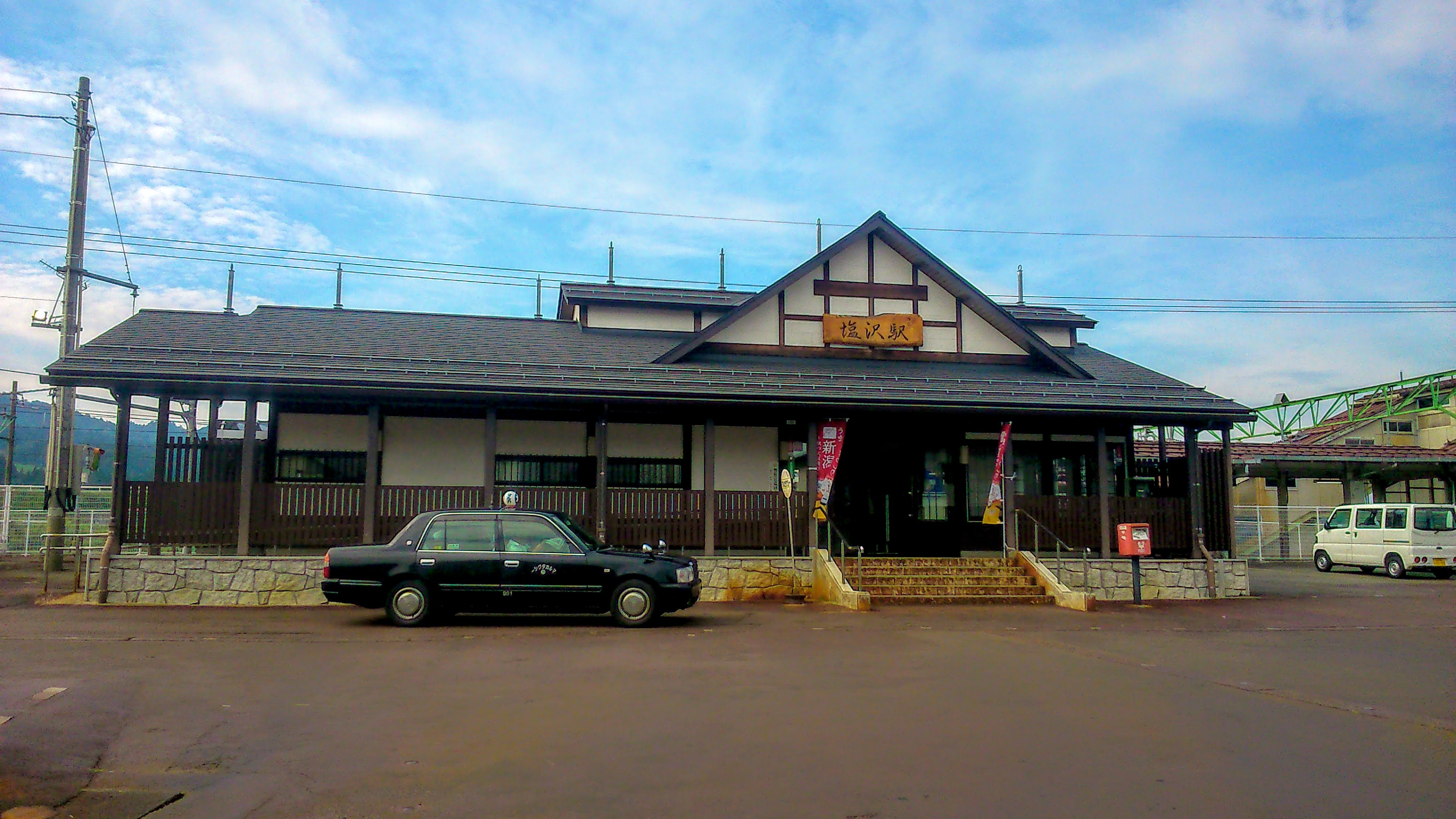 塩沢駅の駅舎